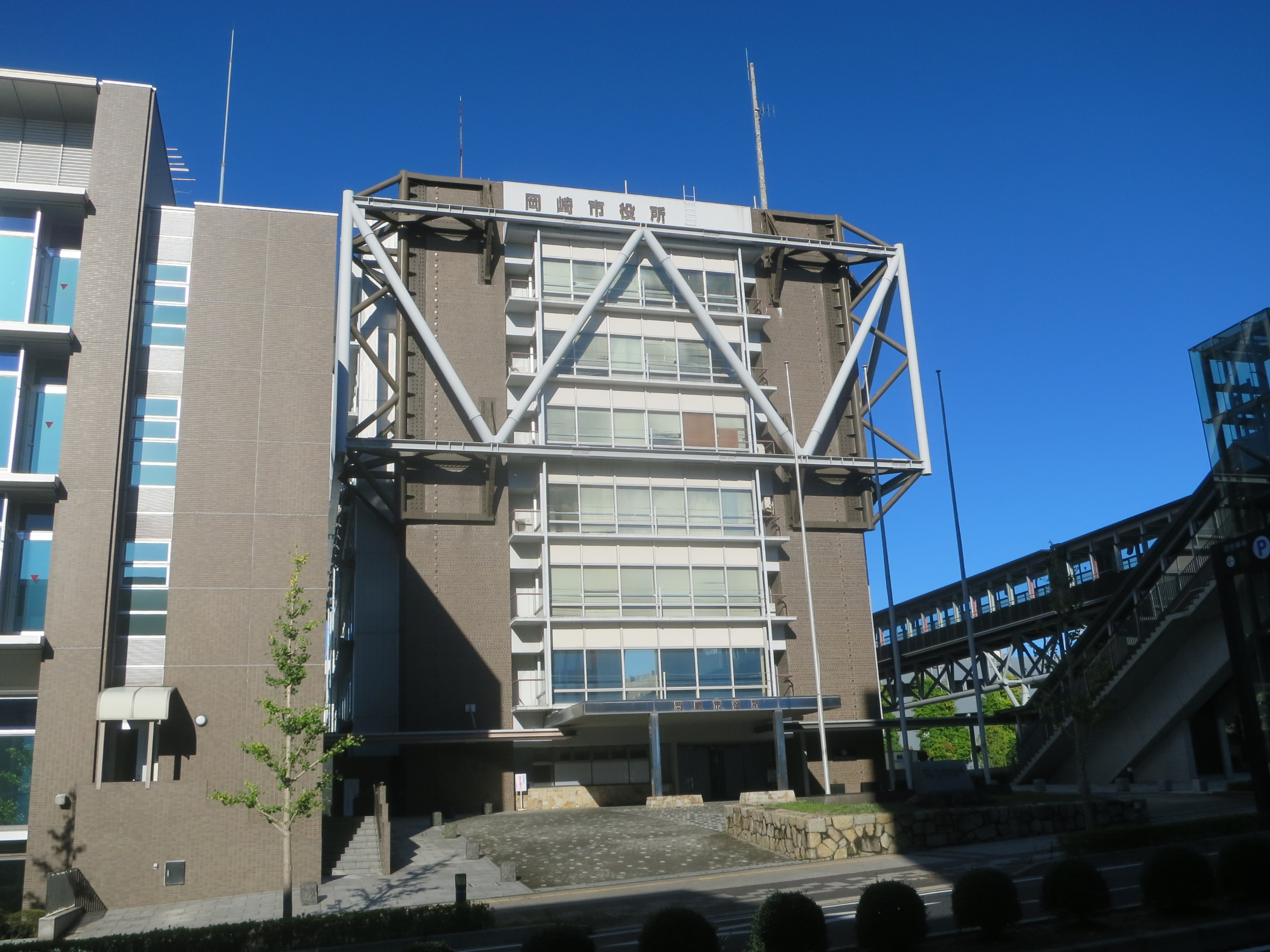 岡崎市役所、西庁舎。